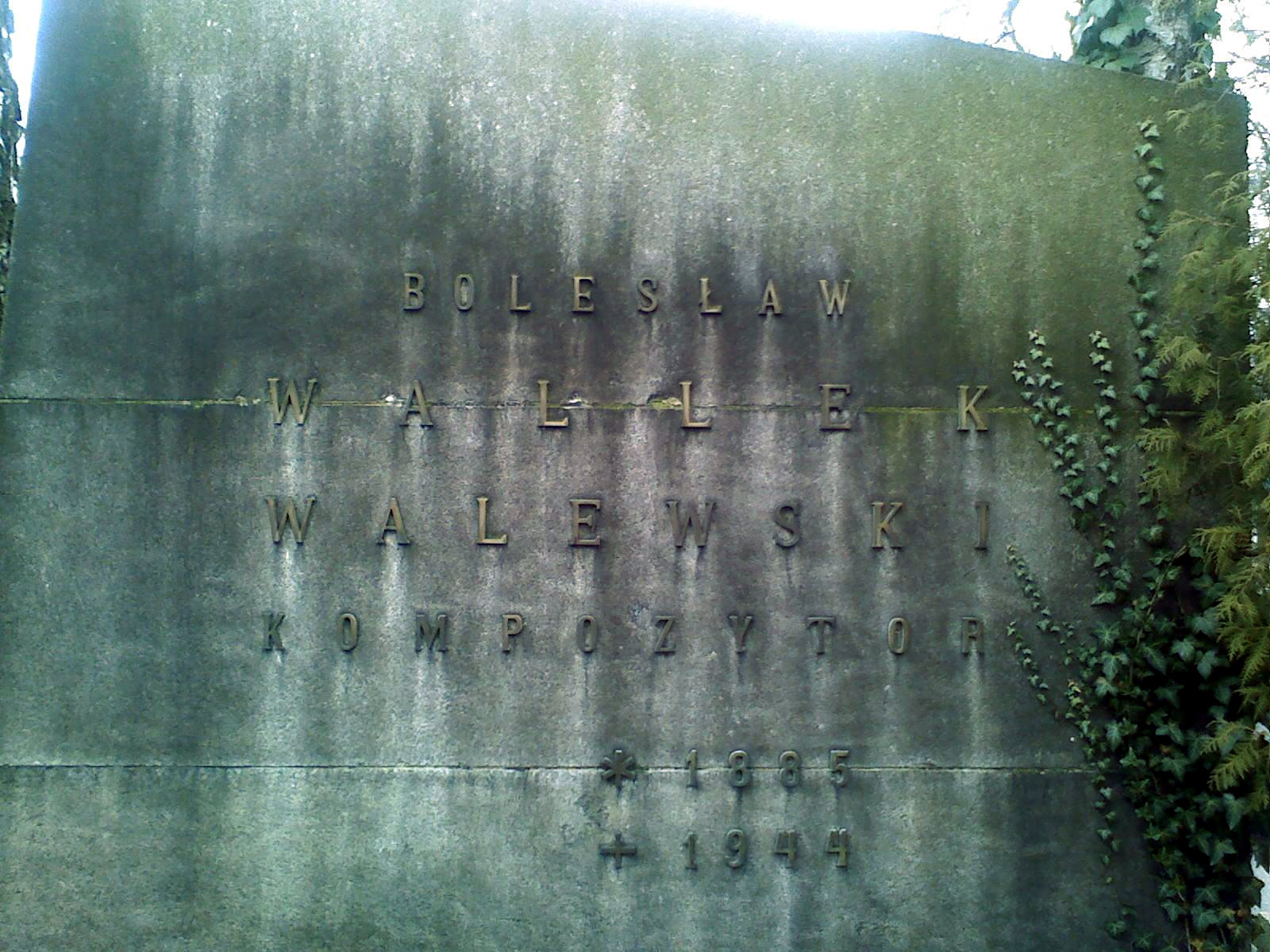 Polish composer Bolesław Wallek-Walewski (1885-1944)